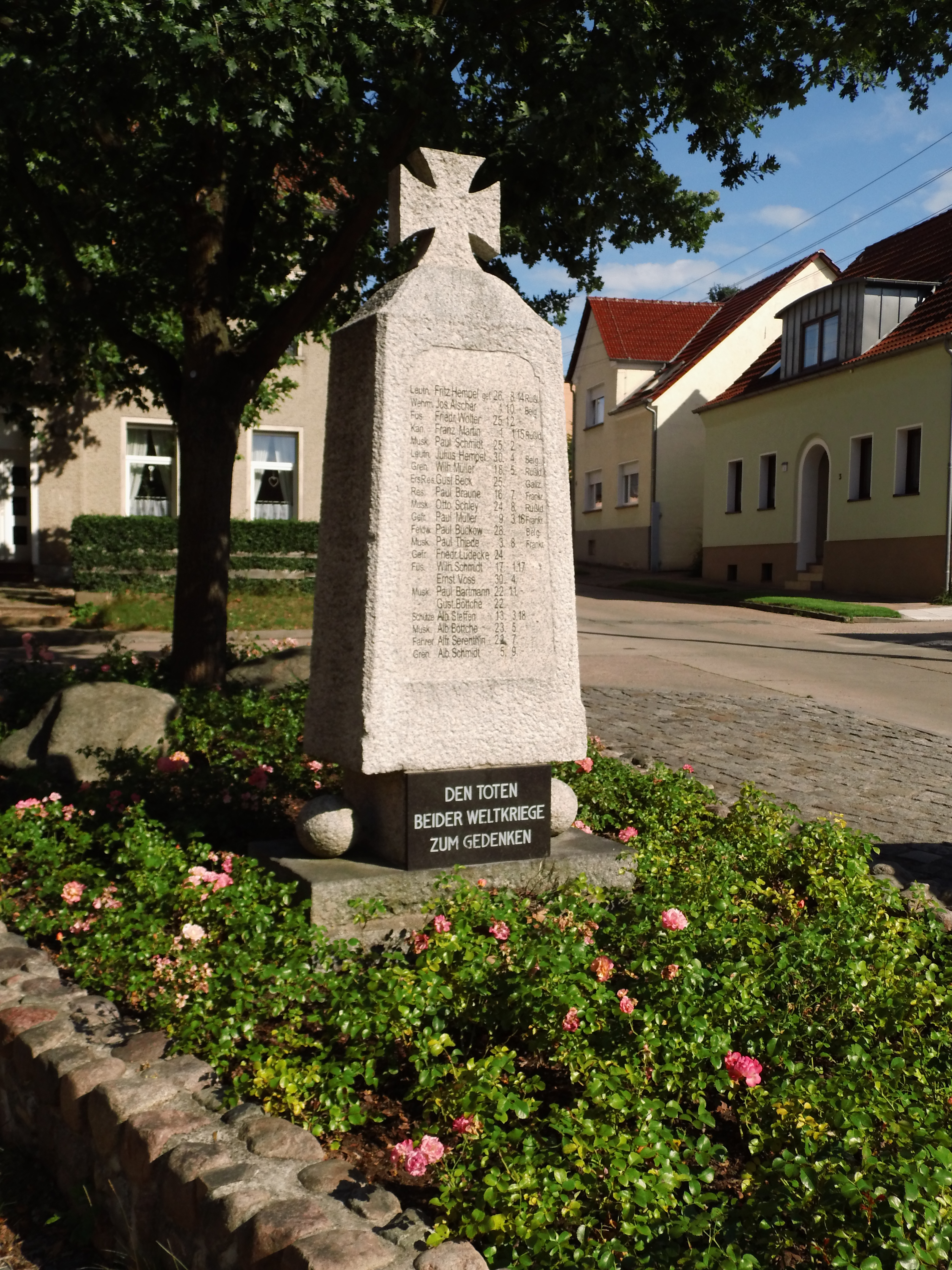 Denkmal der Toten beider Weltkriege in Brandenburg/Göttin zwischen der Göttiner Schulstraße und der Krahner Straße